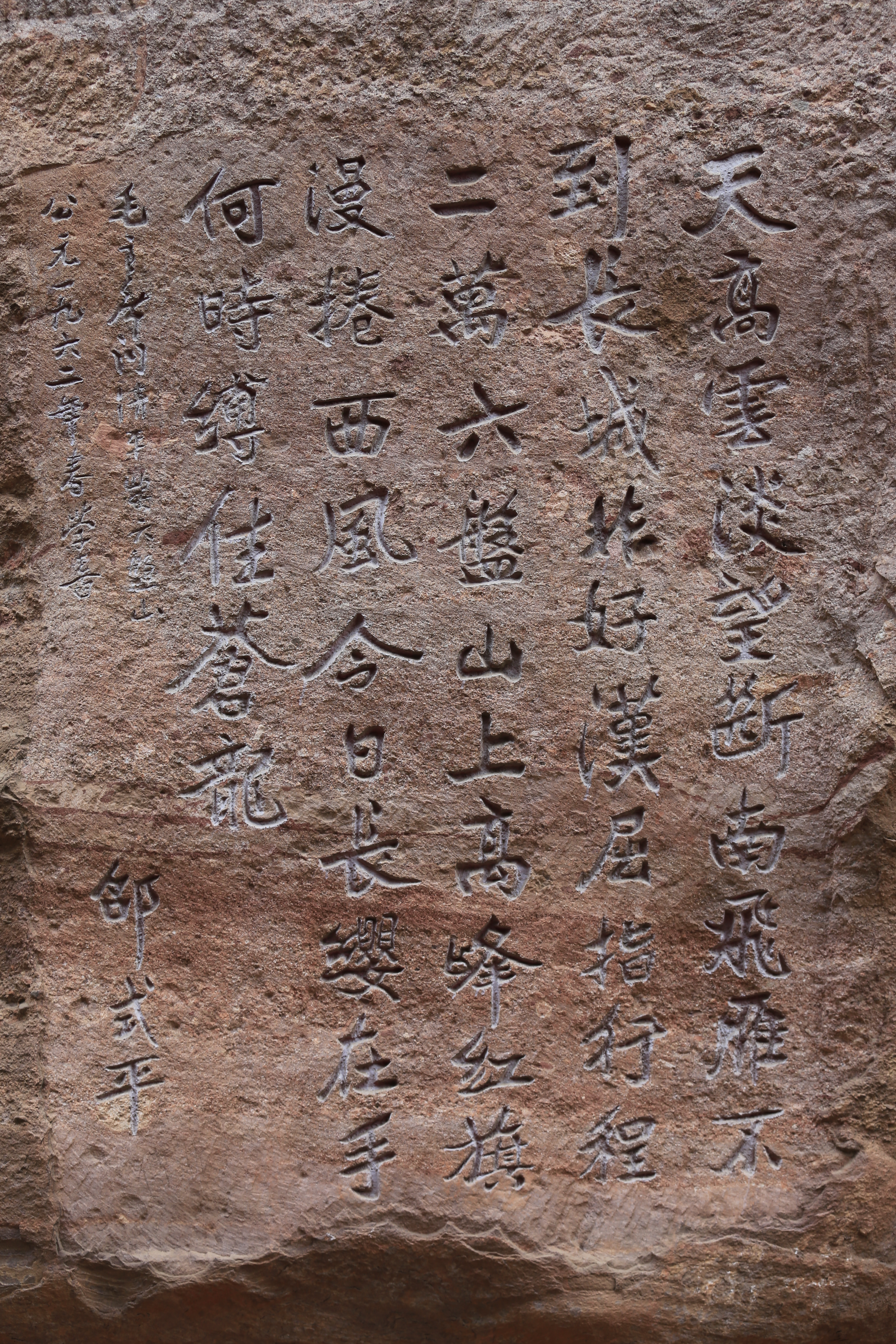 龟峰摩崖石刻